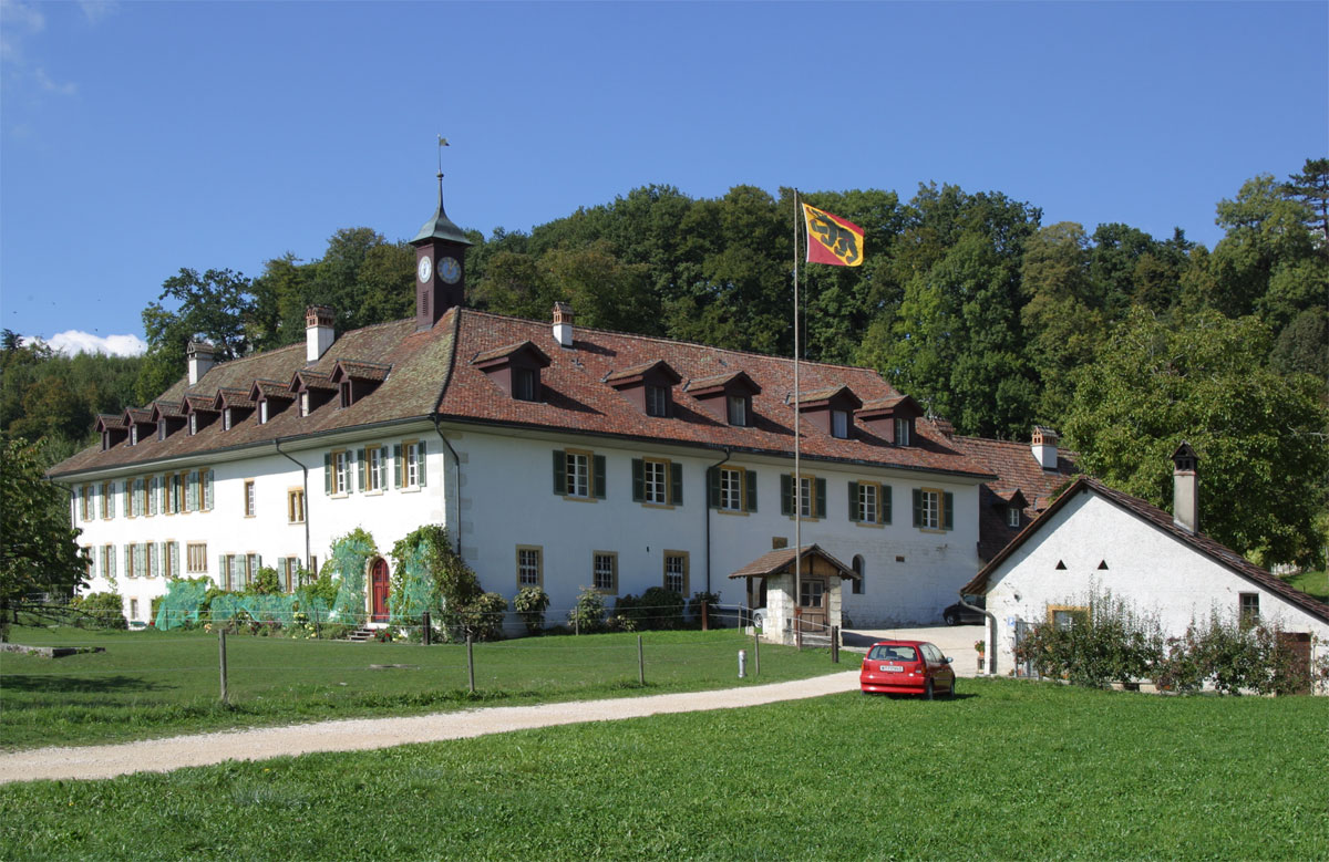 Hotel/Restaurant auf der Petersinsel